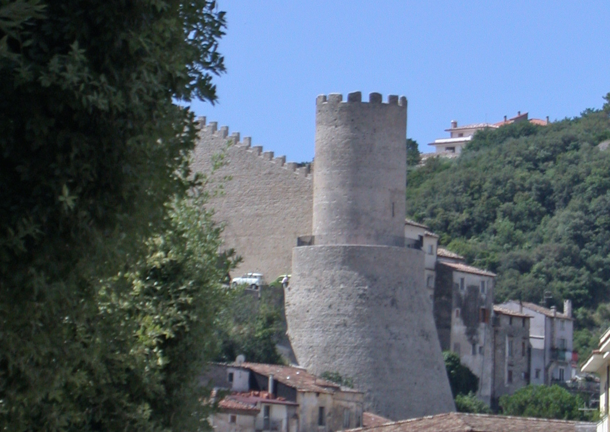 Itri, provincia di Latina, Lazio, Italia. Città alta, il castello